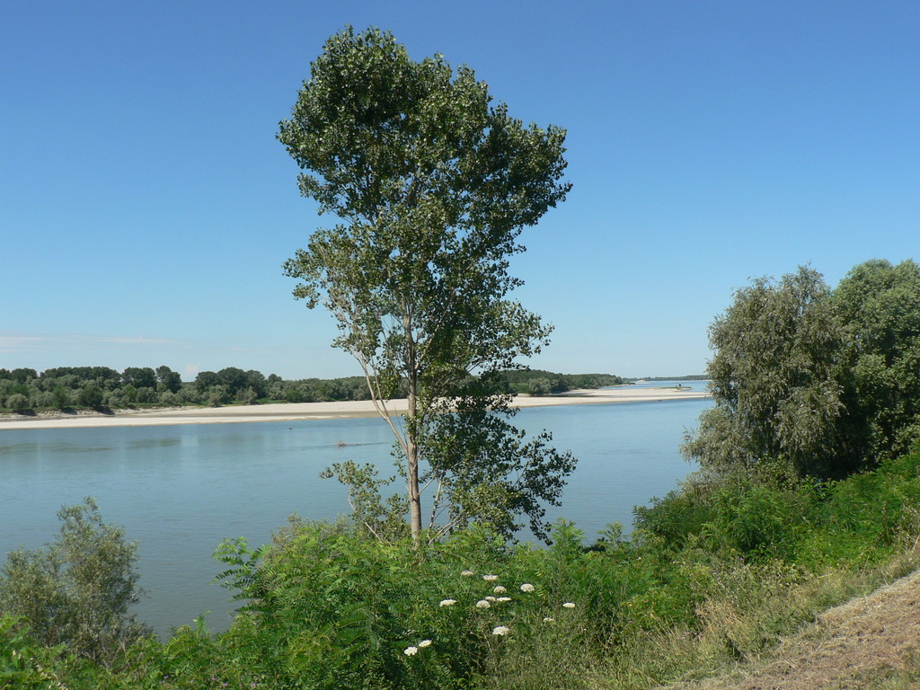 Po nei pressi di Occhiobello.